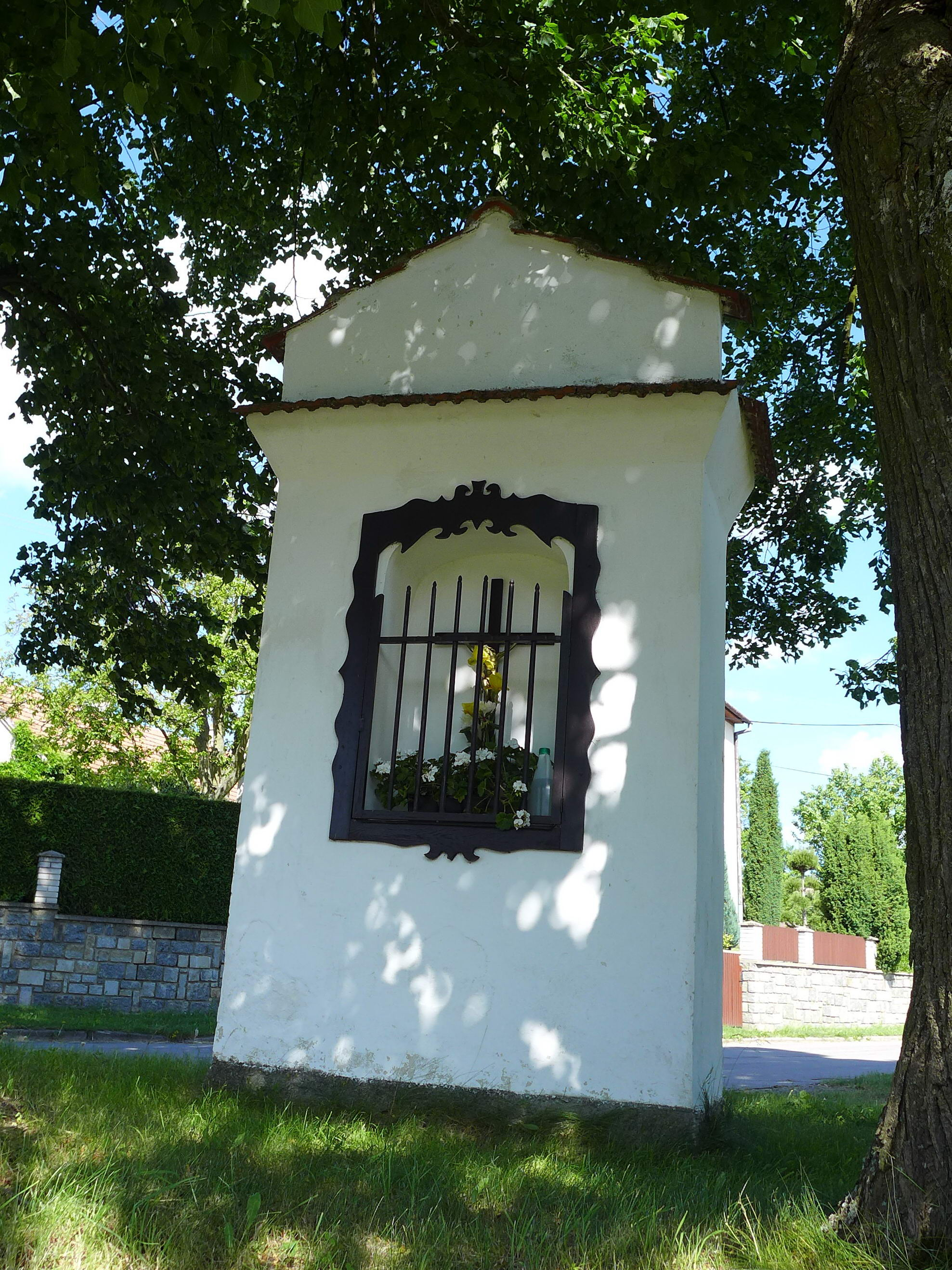 Výklenková kaplička - poklona, při silnici do Nové Říše